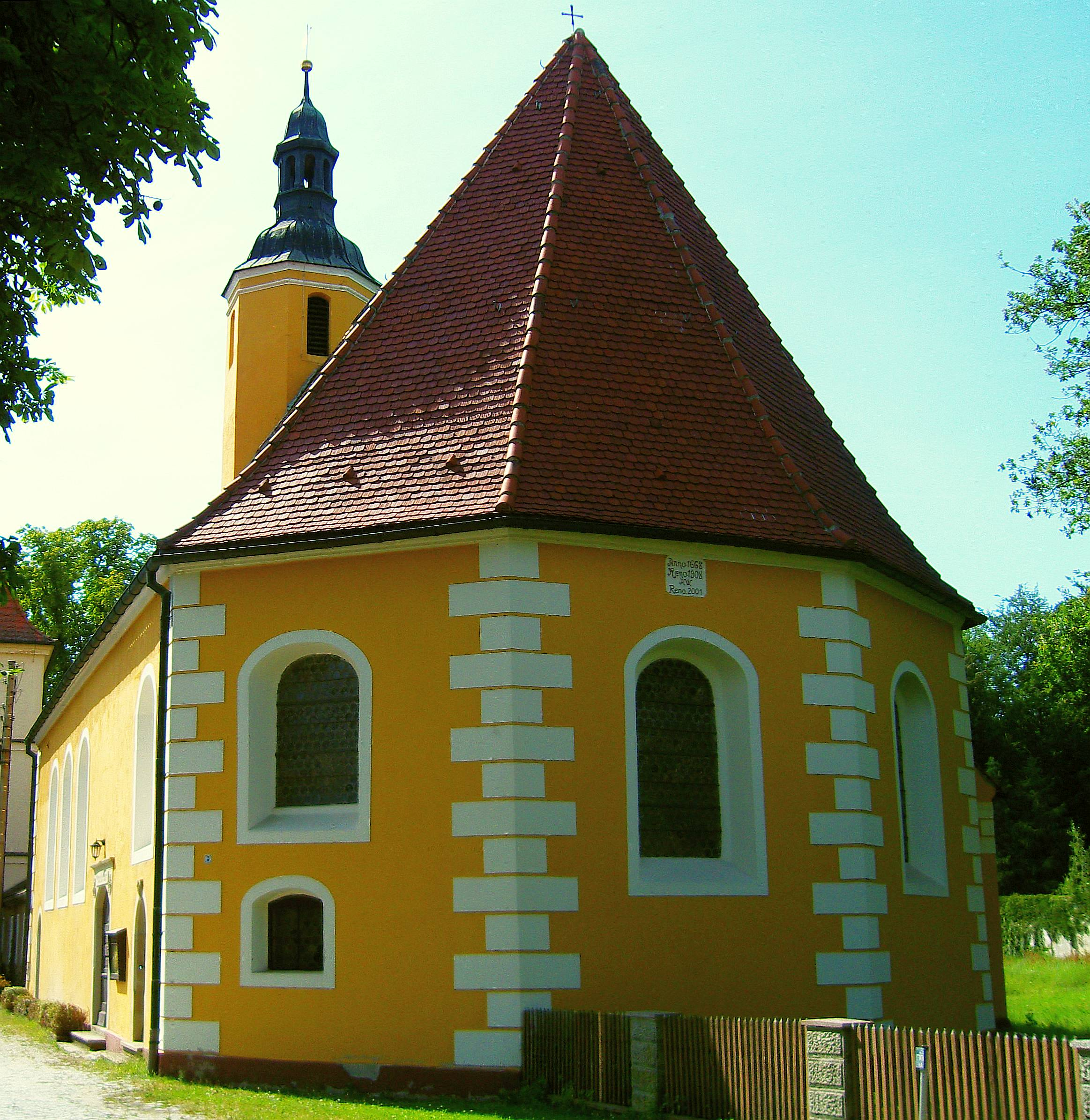 Kirche in Lindenau, Baudenkmal